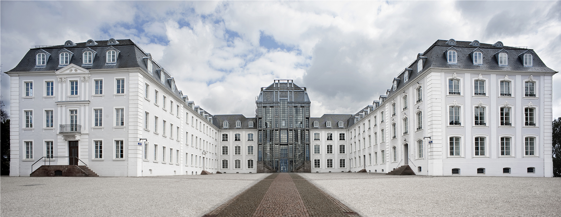 Saarbrücker Schloss, im Stil des Barock unter Friedrich-Joachim Stengel erbaut. Panorama aus zwei Aufnahmen. Aufgenommen mit einem Nikkor Shiftobjektiv. 30° diagonal noch oben geshiftet (links- u. rechtsseitig), dardurch tritt keine perspektivische Verzerrung auf.